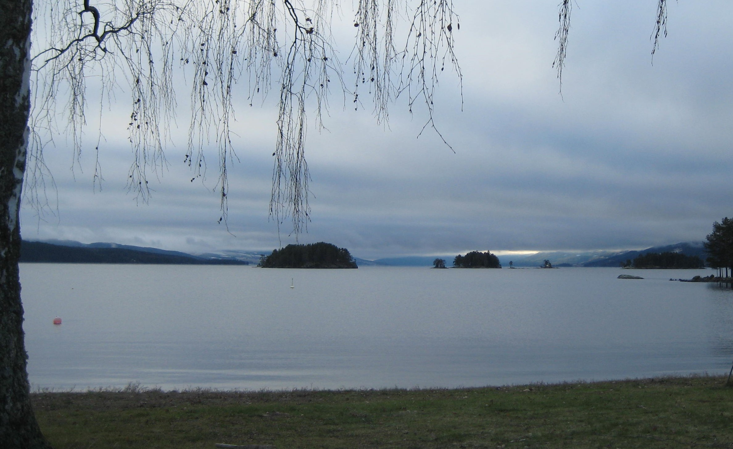 Bergøya,Sandøya og Kongeøya, ved Eidsand